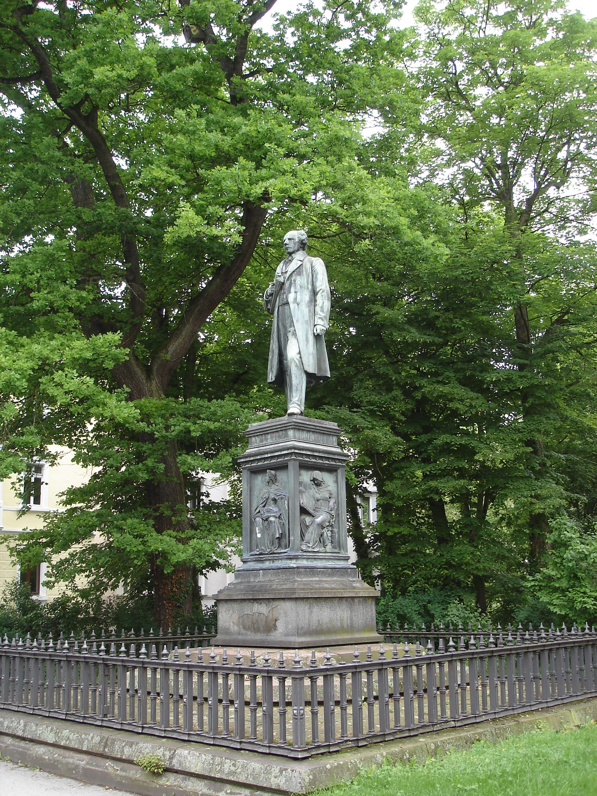 Uhland-Denkmal in Tübingen